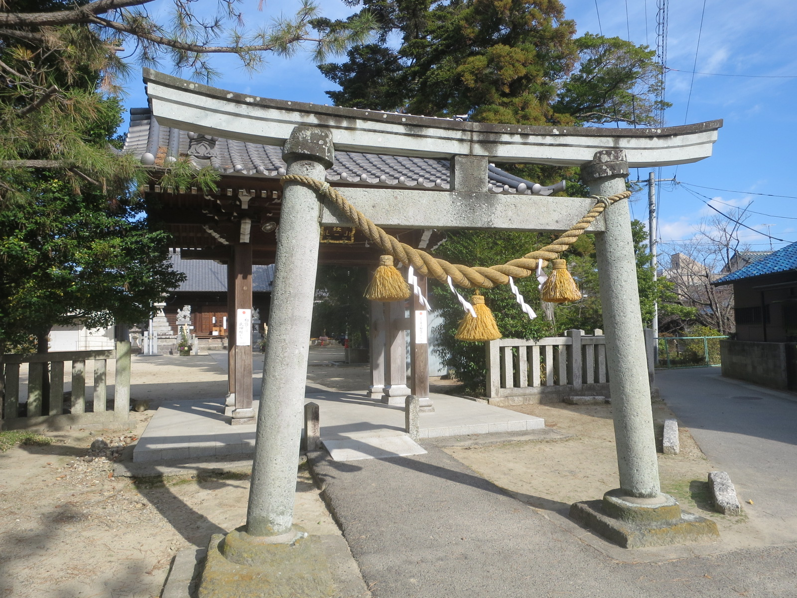 糟目犬頭神社の鳥居